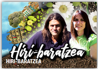 Hamaika Telebistako Hiri Baratzea saoaren irudia. Anabel Arraiza eta Iñigo Segurola